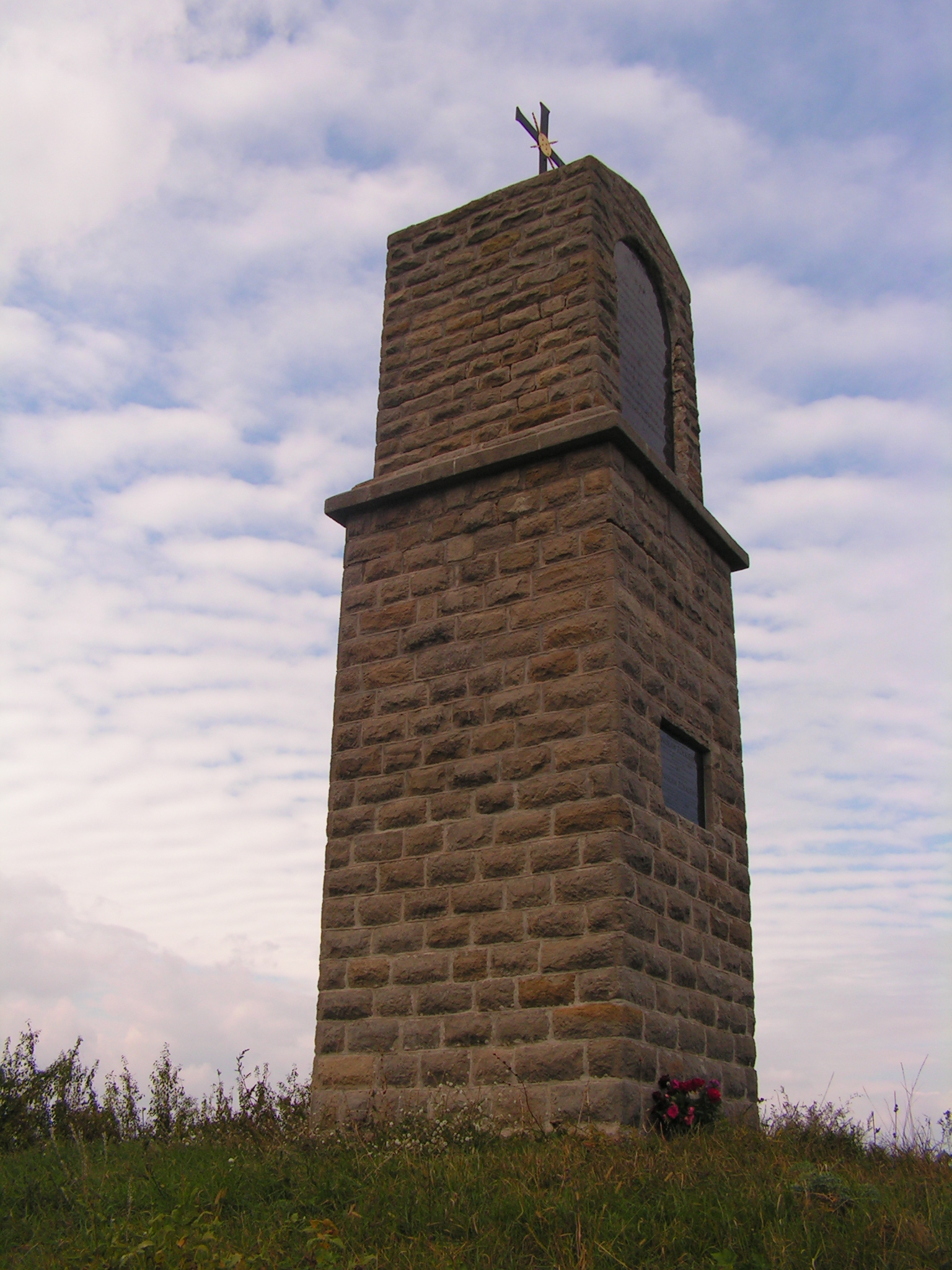 Памятник польскому гетману Станиславу Жолкевскому на месте его смерти в 1620 г. во время отступления после нанесеного турками поражения под Цецорой в Молдавии